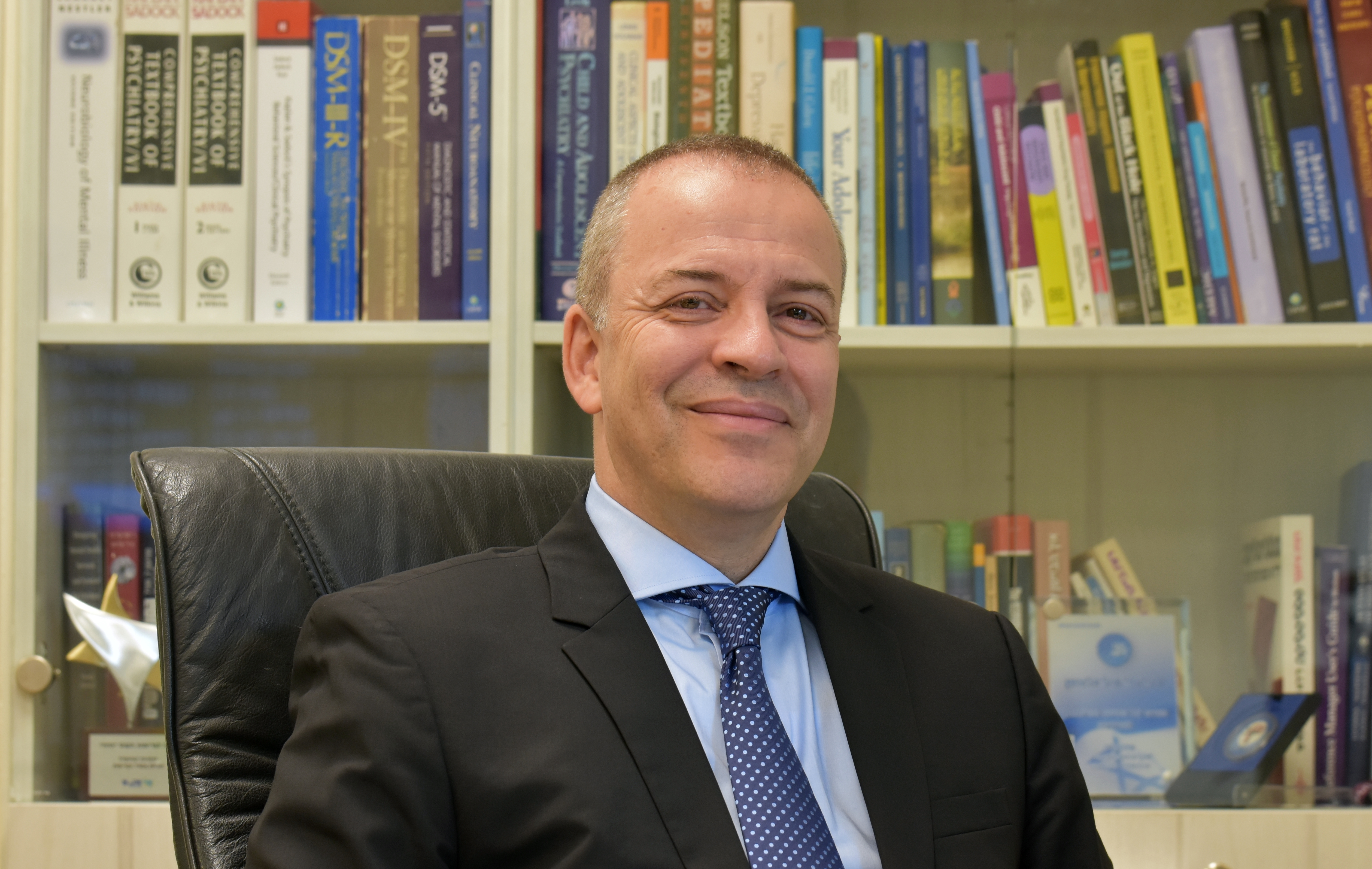 פרופסור גיל זלצמן, 2016